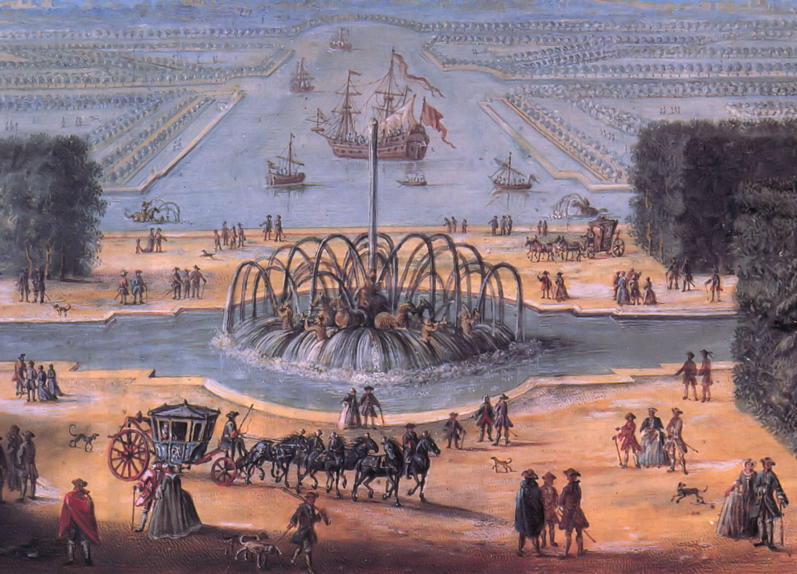 label QS:Lfr,"Le Bassin d'Apollon dans le parc du château de Versailles, en France. Gravure du XVIIe siècle." label QS:Lnl,"Le Bassin d'Apollon, Versailles. ws. 17e eeuw."